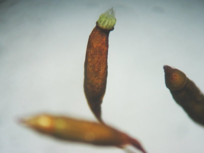 Detail der Kapseln von Atrichum undulatum, Müritz-Gebiet